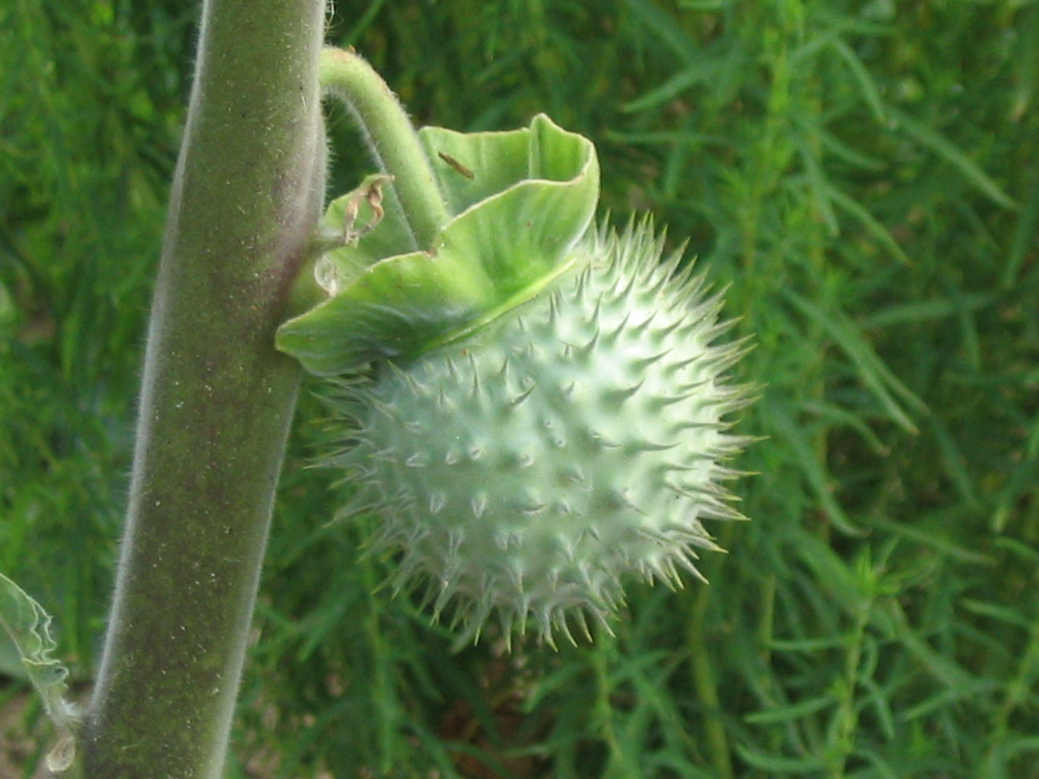 Datura : inmature fruit. Author: Goku122